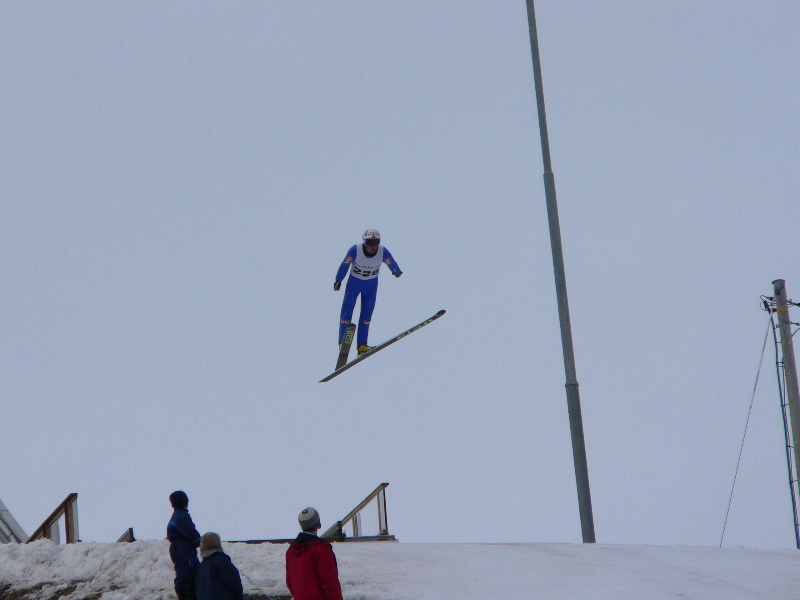 Norwegian ski jumper Sigurd Pettersen. Taken in Holmenkollen